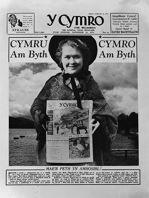 Teitl Cymraeg/Welsh title:Tudalen flaen 'Y Cymro' ar Ddydd Gŵyl Dewi Ffotograffydd/Photographer: Geoff Charles (1909-2002) Dyddiad/Date: February 26, 1954. Cyfrwng/Medium: Negydd ffilm / Film negative Cyfeiriad/Reference: (gch05644) Rhif cofnod / Record no.: 3367642 Rhagor o wybodaeth am gasgliad Geoff Charles yn Llyfrgell Genedlaethol Cymru More information about the Geoff Charles Collection at the National Library of Wales Mae ffotograffau Geoff Charles hefyd yn rhan o Broject Europeana Libraries, cliciwch yma am fwy o wybodaeth Geoff Charles' photographs also form part of the Europeana Libraries Project, click here for more information